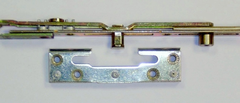 Pilzkopfverriegelung, Deutschland.